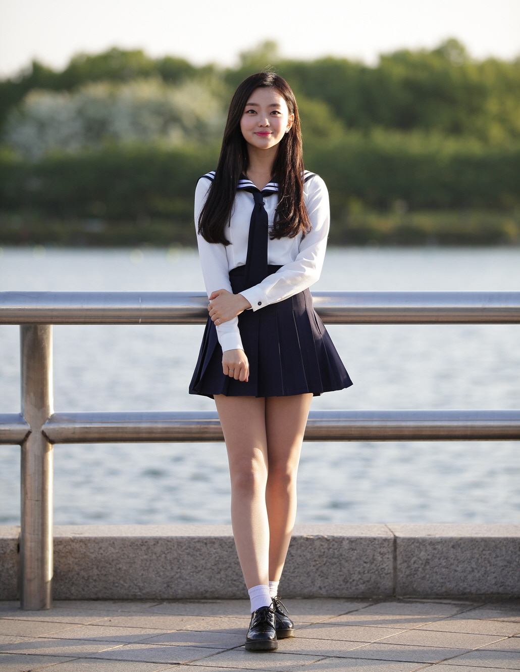 아이돌마스터.KR-꿈을 드림 (리얼걸 프로젝트(Real Girls Project) 일산 호수공원)